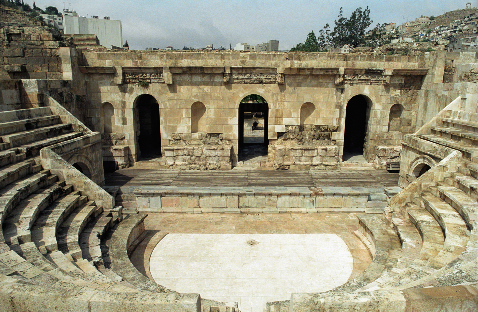 Roman Odeon in Amman, Jordan